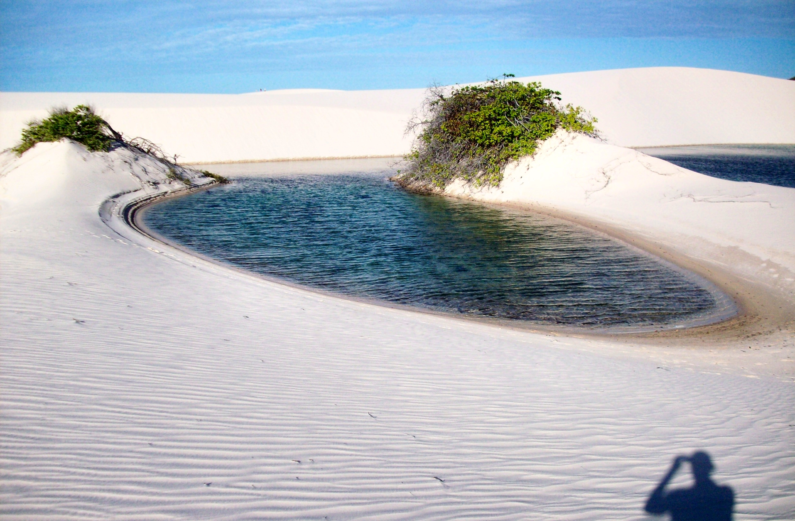 Dunes de sable blanc et lagunes d'eau douce